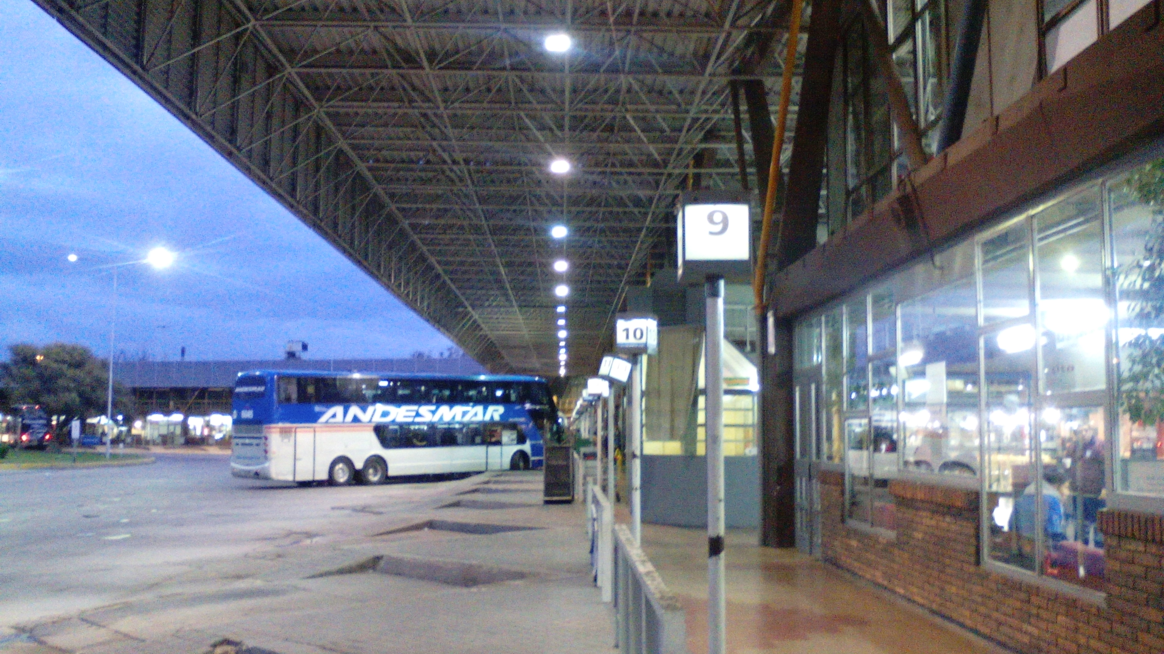 Terminal de Omnibus de Mendoza